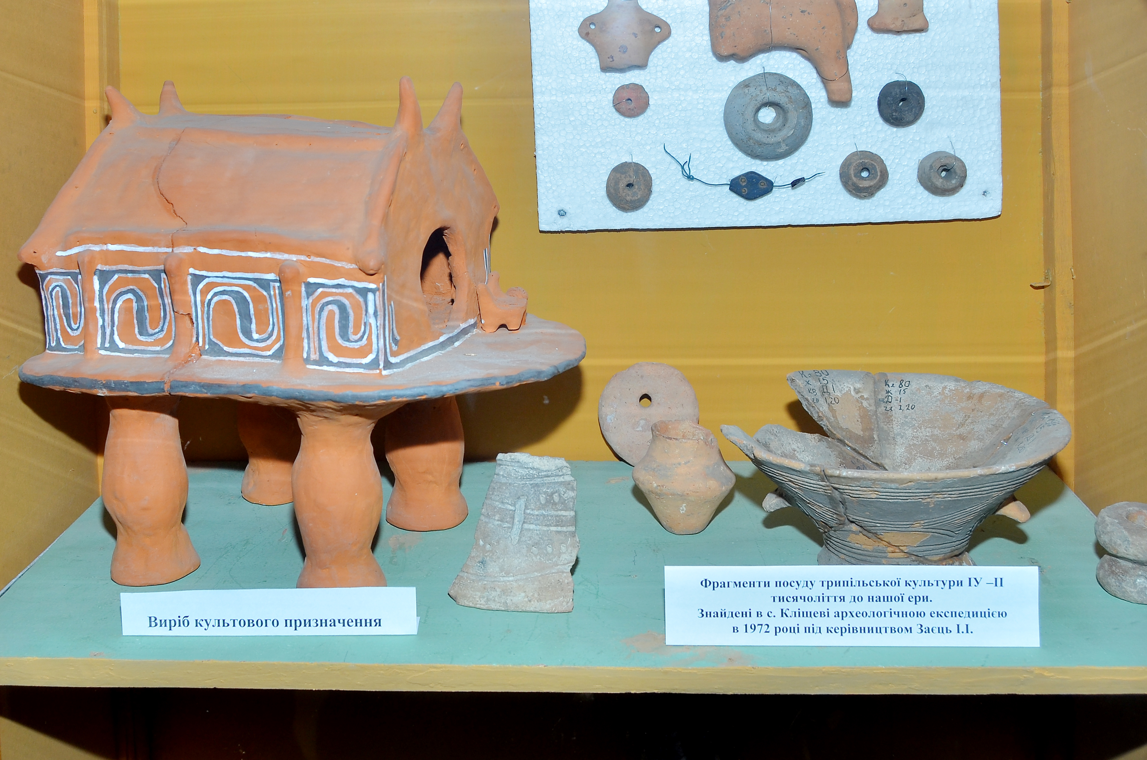 Поселення трипільської культури, с. Кліщів. З експозиції Тиврівського районного краєзнавчого музею